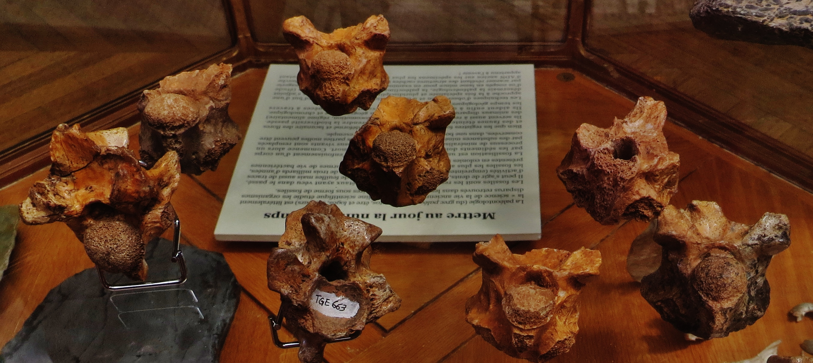 Palaeophis fossil